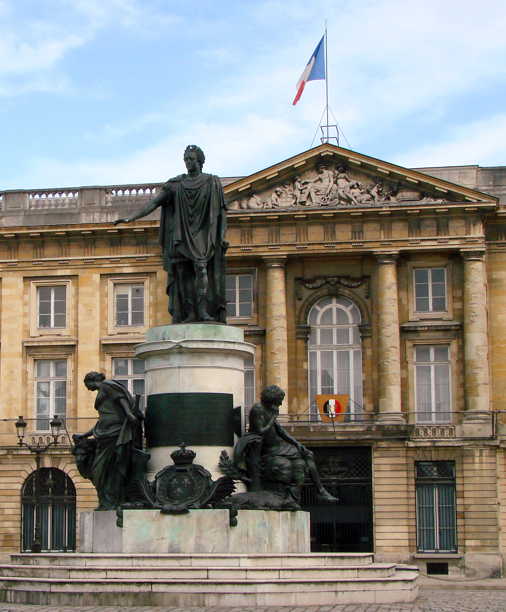 Statue de Louis XV, Place Royale à Reims. Le monument a été érigé en 1765; les allégories de la base sont de Jean-Baptiste Pigalle. La statue de Louis XV vêtu à la romaine, par Pigalle, a été détruite à la Révolution, et remplacée en 1818 par une oeuvre de Pierre Cartellier.